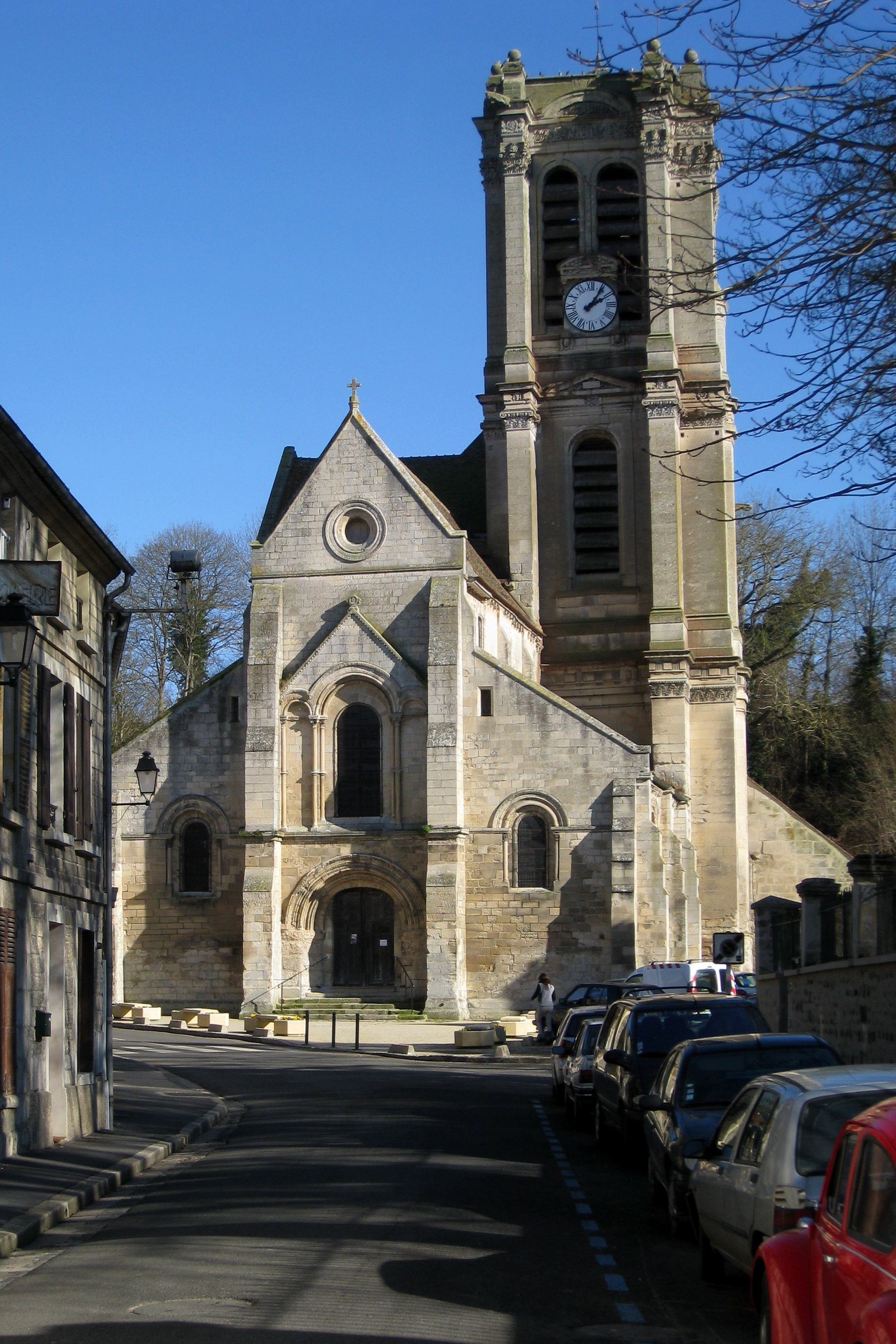 L'église de Chars, Val d'Oise, France